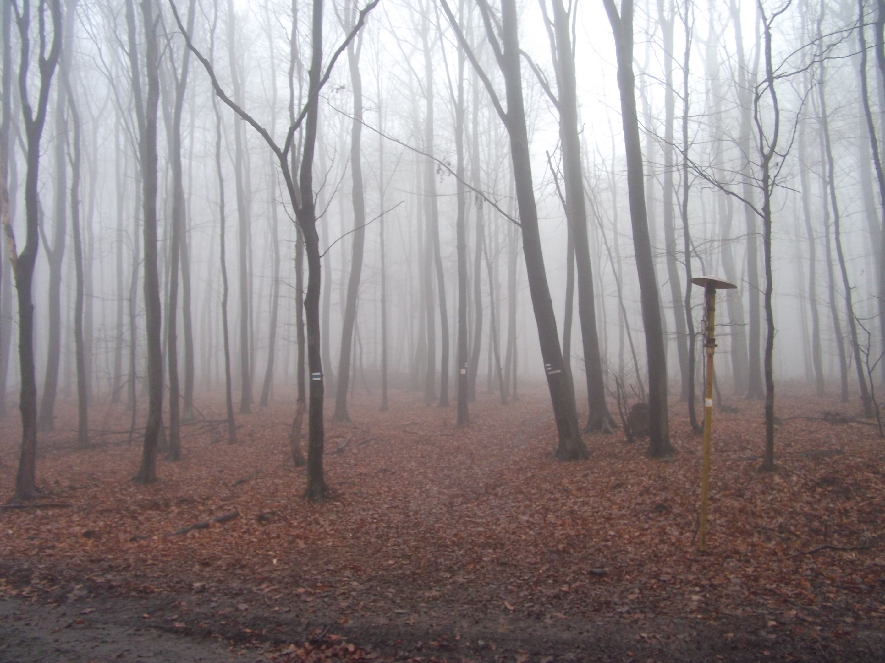 Rázcestie turistických trás na Malinskom vrchu